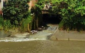 La Rosa stream, Medellin